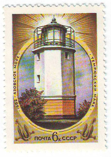 Почтовая марка СССР. Темрюкский маяк. Номер в каталоге ЦФА 5362